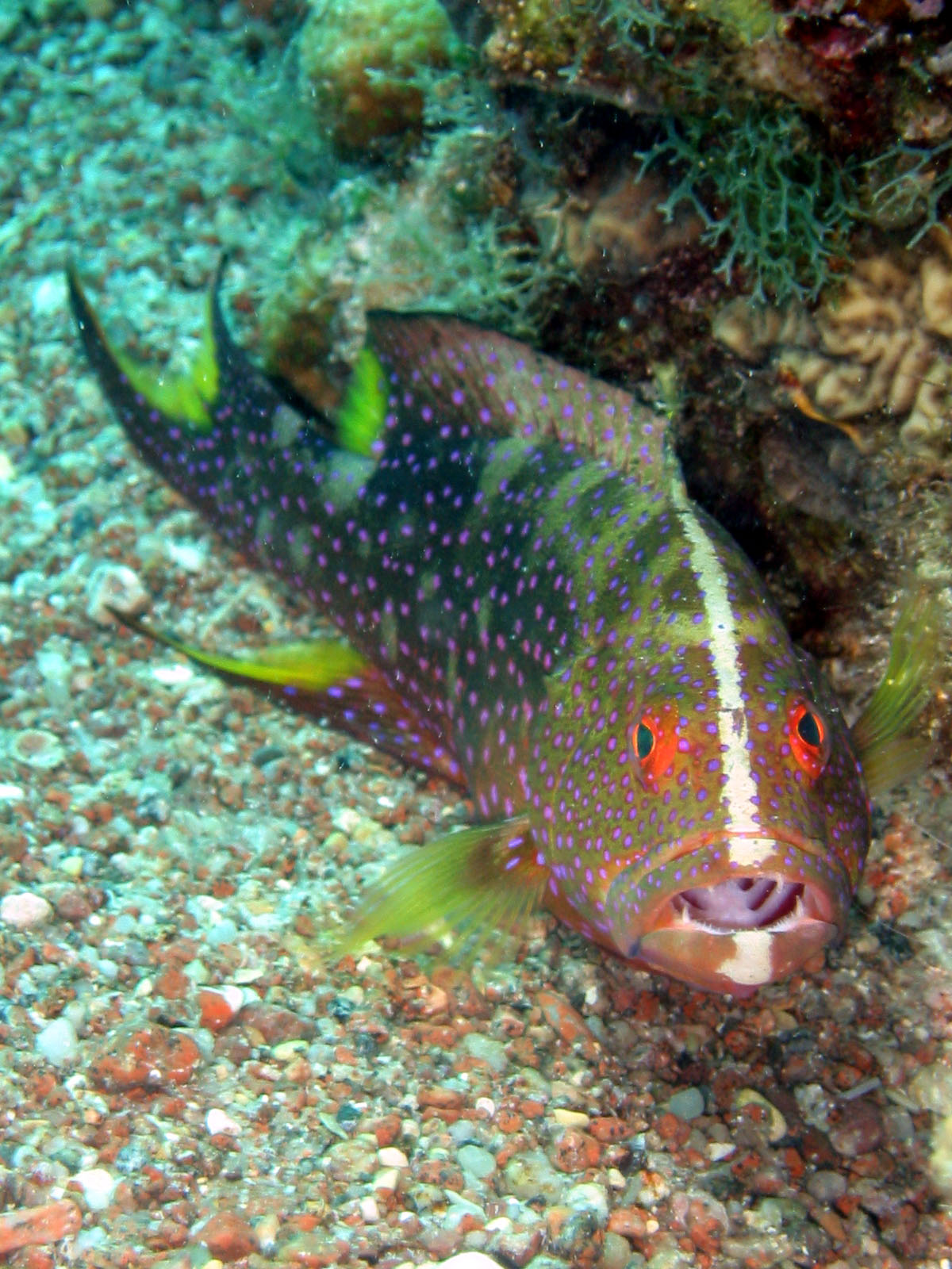 lyretail grouper Taba 2007